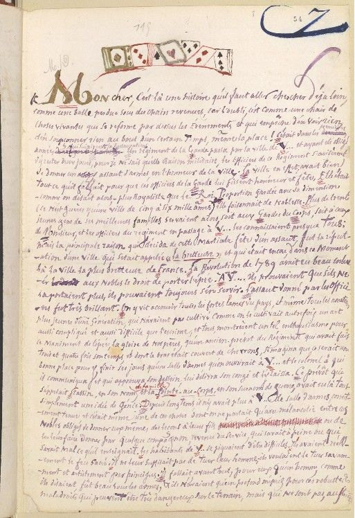 Page manuscrit de la nouvelle des Diaboliques : Le bonheur dans le crime folio 54 de Jules Barbey d'Aurevilly (1808-1889)